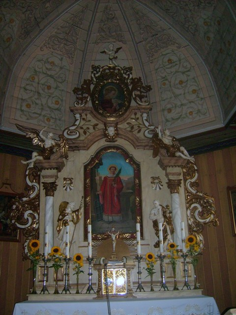 Ołtarz główny